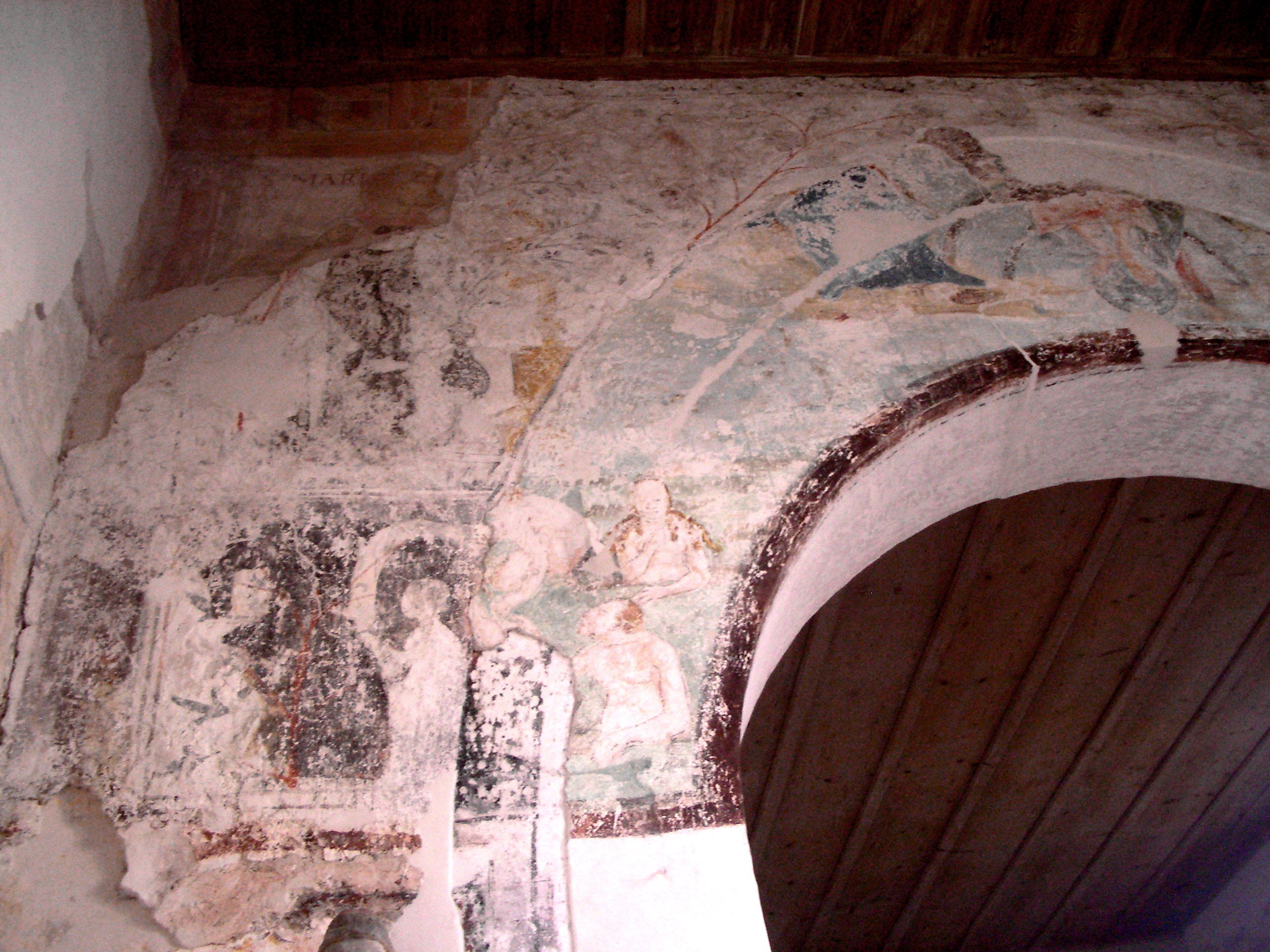 Überlingen, Germany: Kapelle St. Sylvester in Goldbach